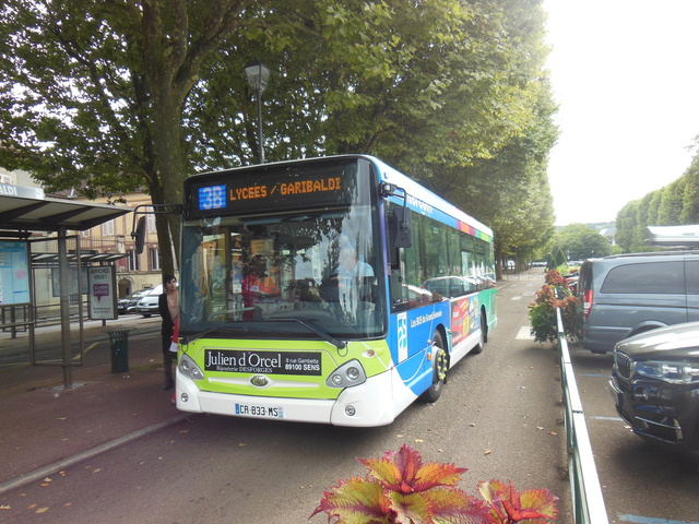 Bus du réseau de transports urbains de Sens, Intercom